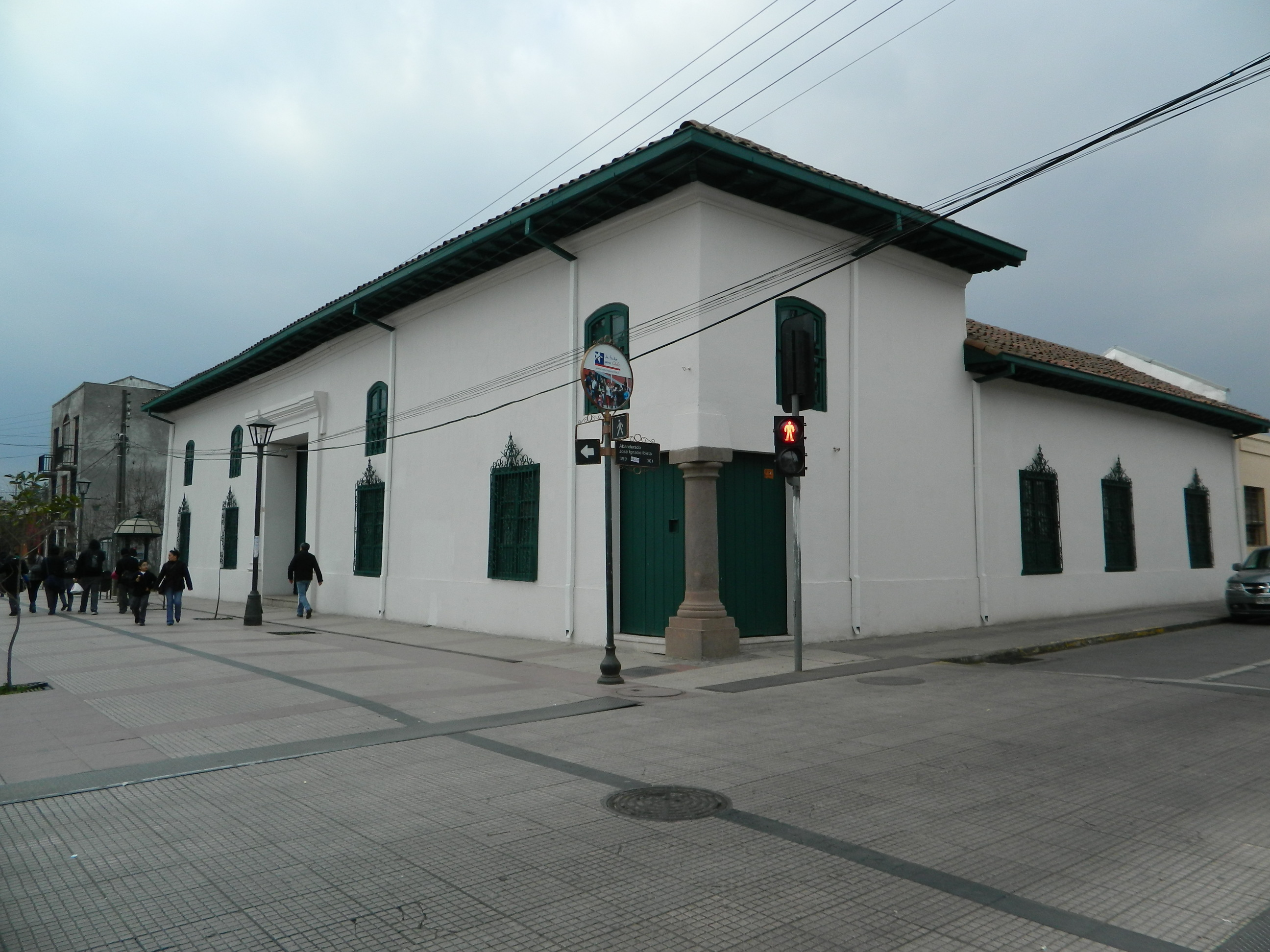 Casa del Pilar de Piedra o Casa del Pilar de Esquina. Actual Museo de Rancagua. En ella se realizan exposiciones temporales y diversas actividades culturales organizadas tanto por el museo y otras instituciones. En su segundo piso se exhiben objetos de la historia regional, a través de artes u oficios tradicionales de la región. This is a photo of a national monument in Chile: 1383